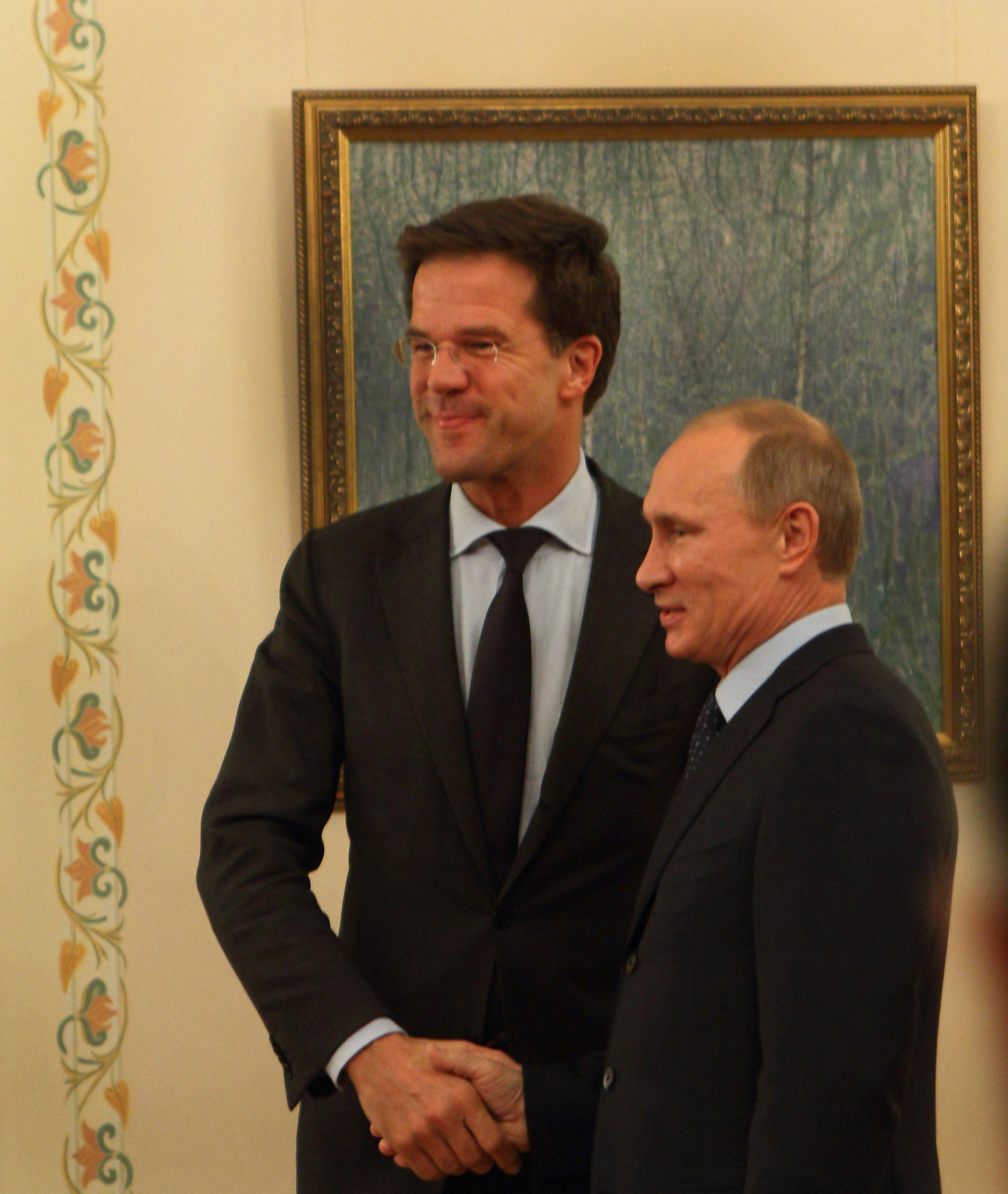 Minister-president Rutte tijdens zijn ontmoeting met premier Poetin in Moskou.